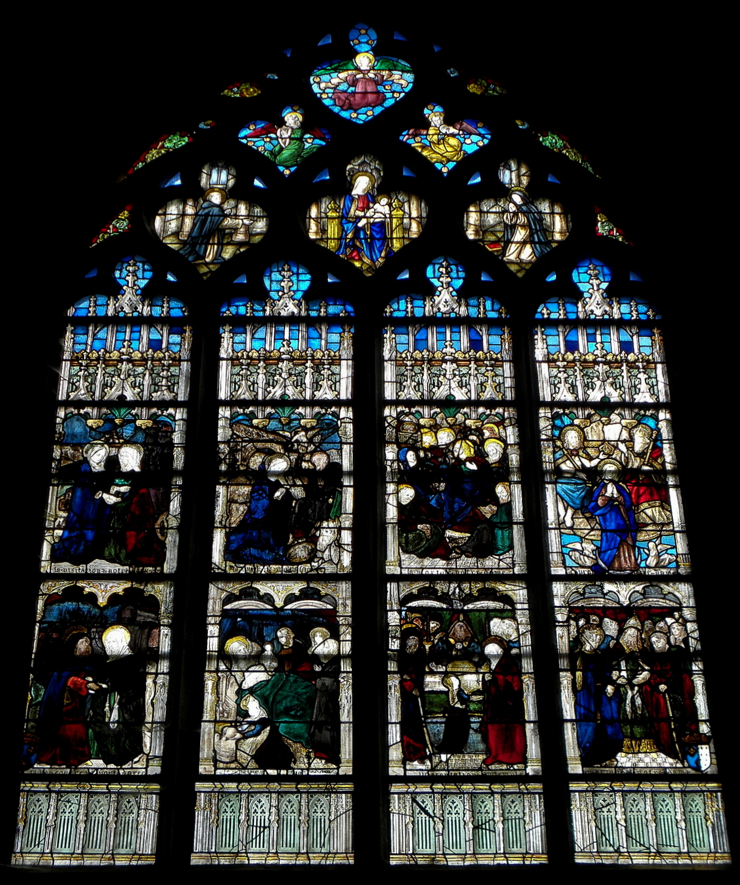 Baie 06 de l'église de Saint-Léry (56)..